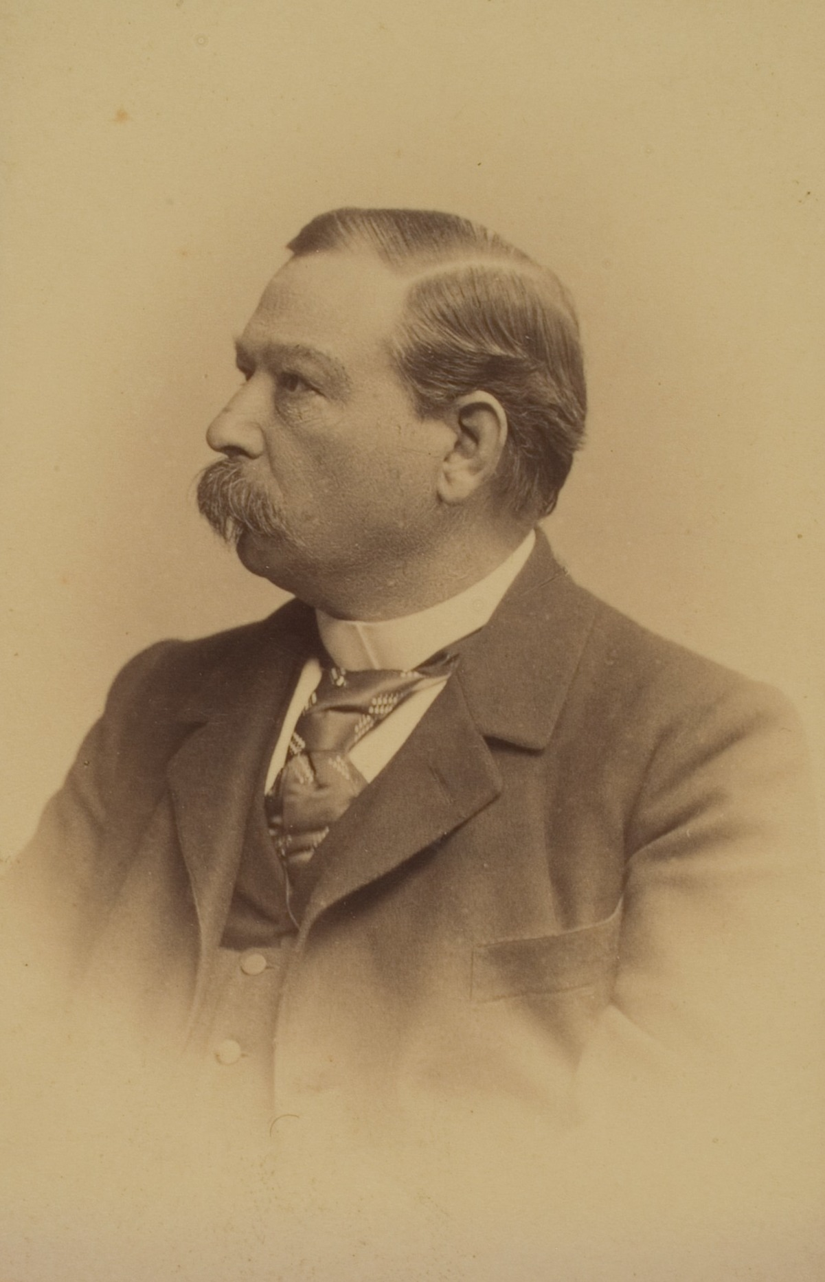 Hermann Friedrich Lossen, Chirurg, 1875–1909 Professor in Heidelberg